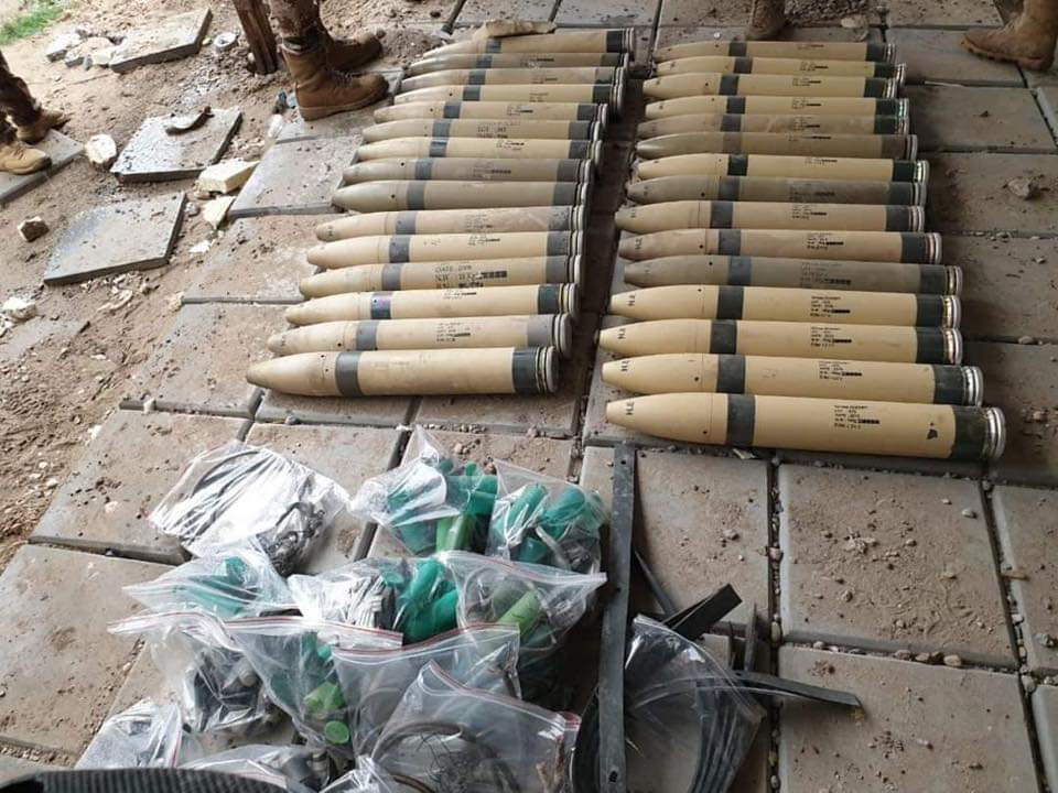 صورايخ كاتيوشا كانت جاهزة للإطلاق على قاعدة التاجي في العراق